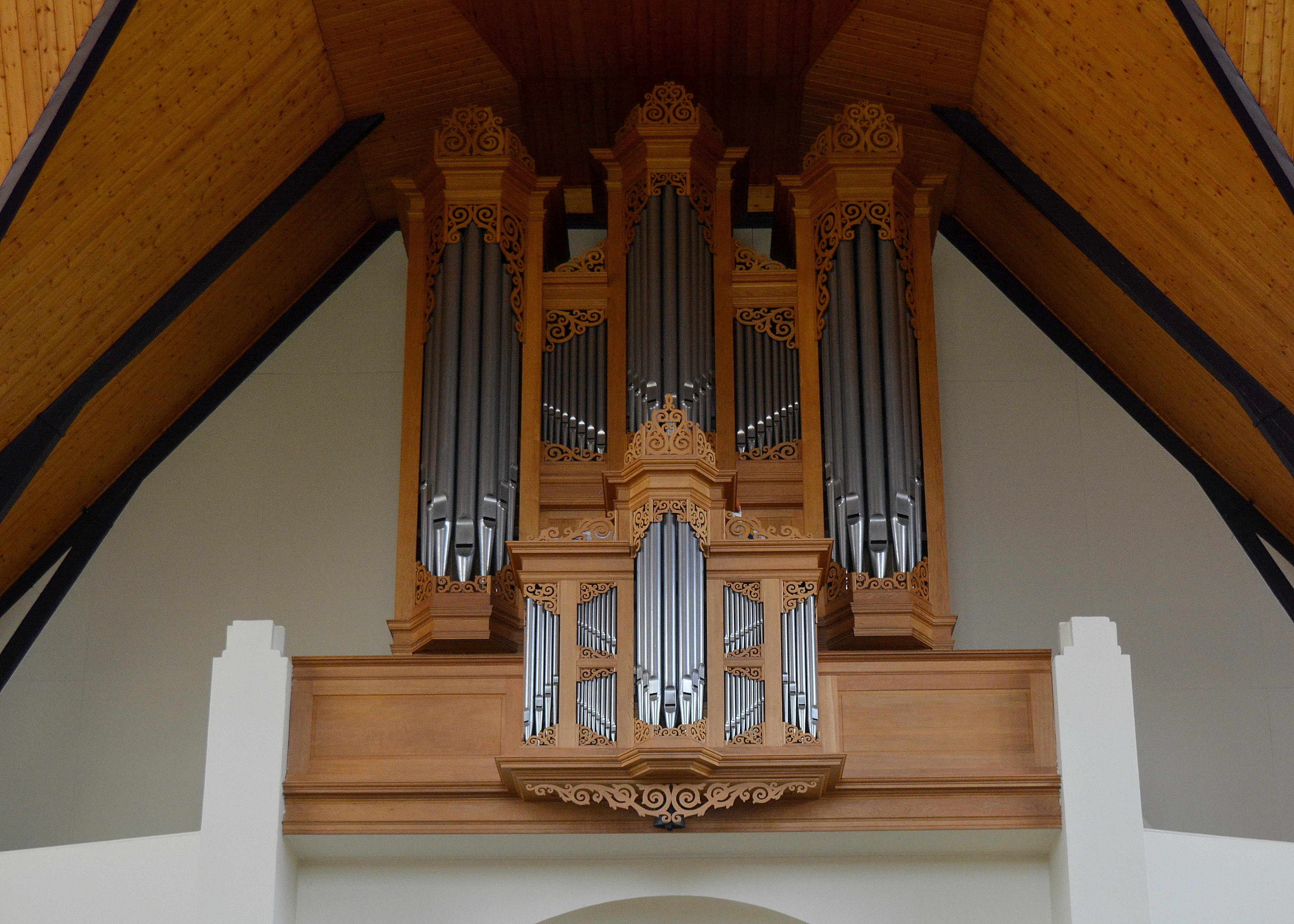 Orgel gereformeerde kerk Kollumerzwaag